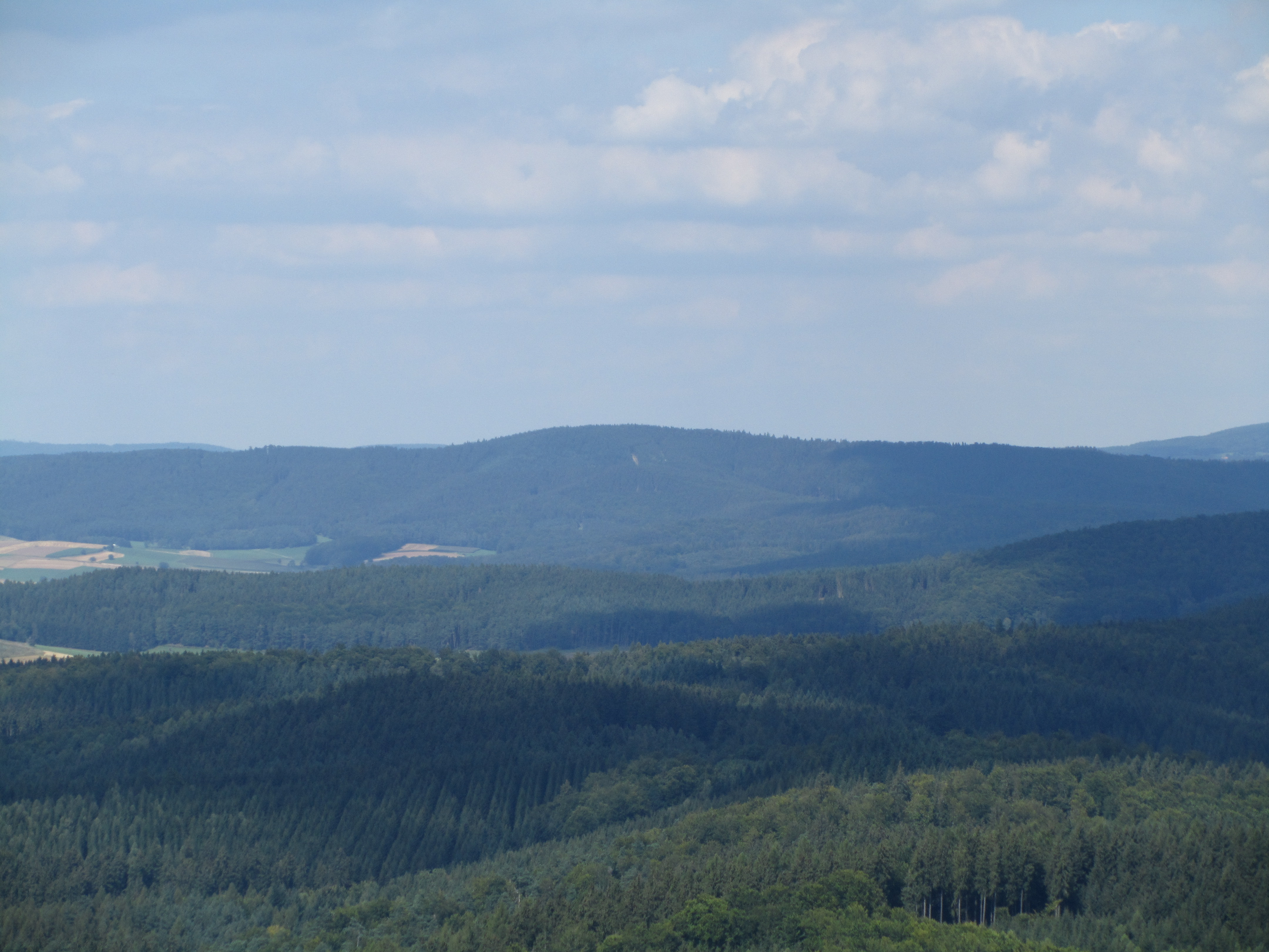 Der Eisberg (583 m) im Stölzinger Gebirge von Süden, gesehen vom Alheimerturm